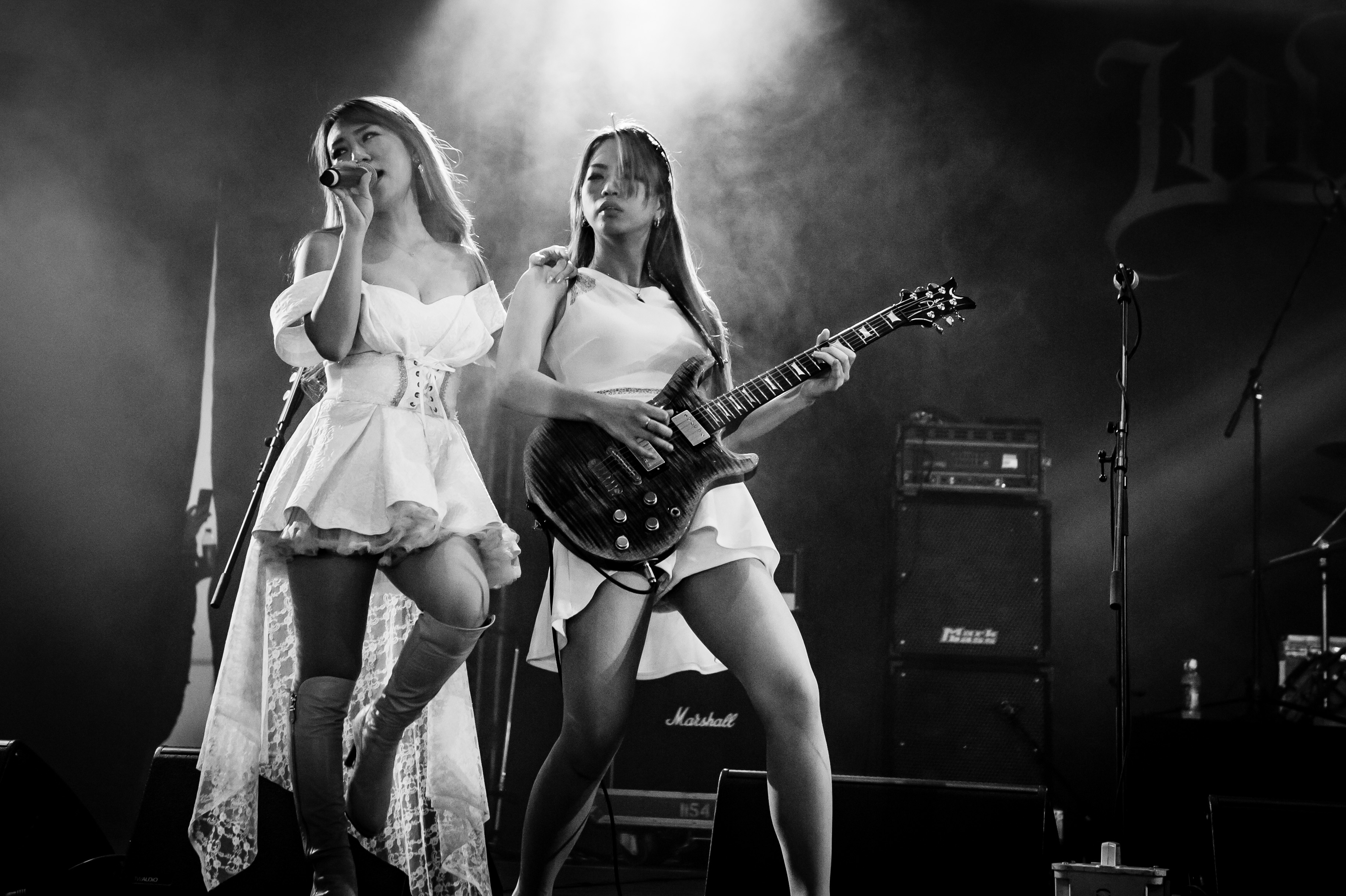 'Wacken Open Air 2018': 'Lovebites'